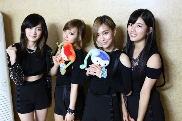 2012년 7월 5일 여수 엑스포 팝 페스티벌에서 미스에이.